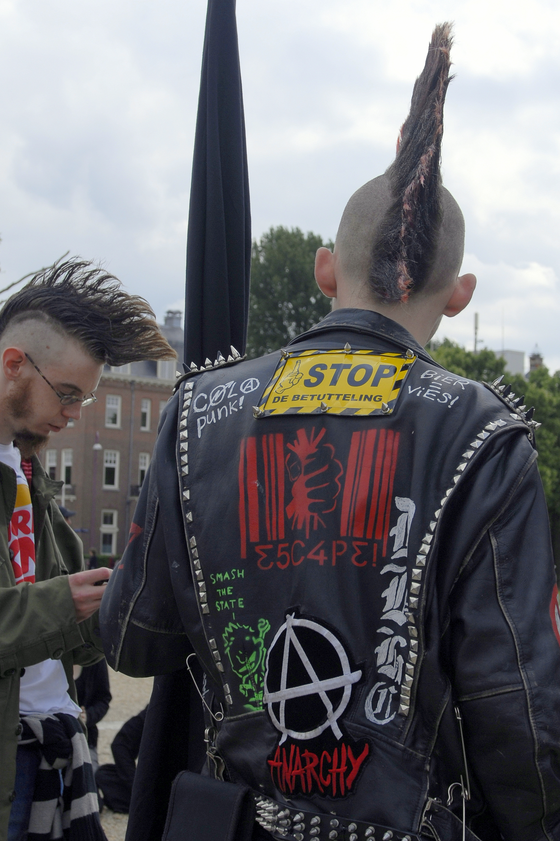 Museumplein, 14 Jun 2008